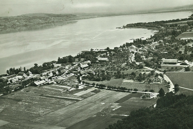 Faoug vu d'avion au début du 20e siècle.